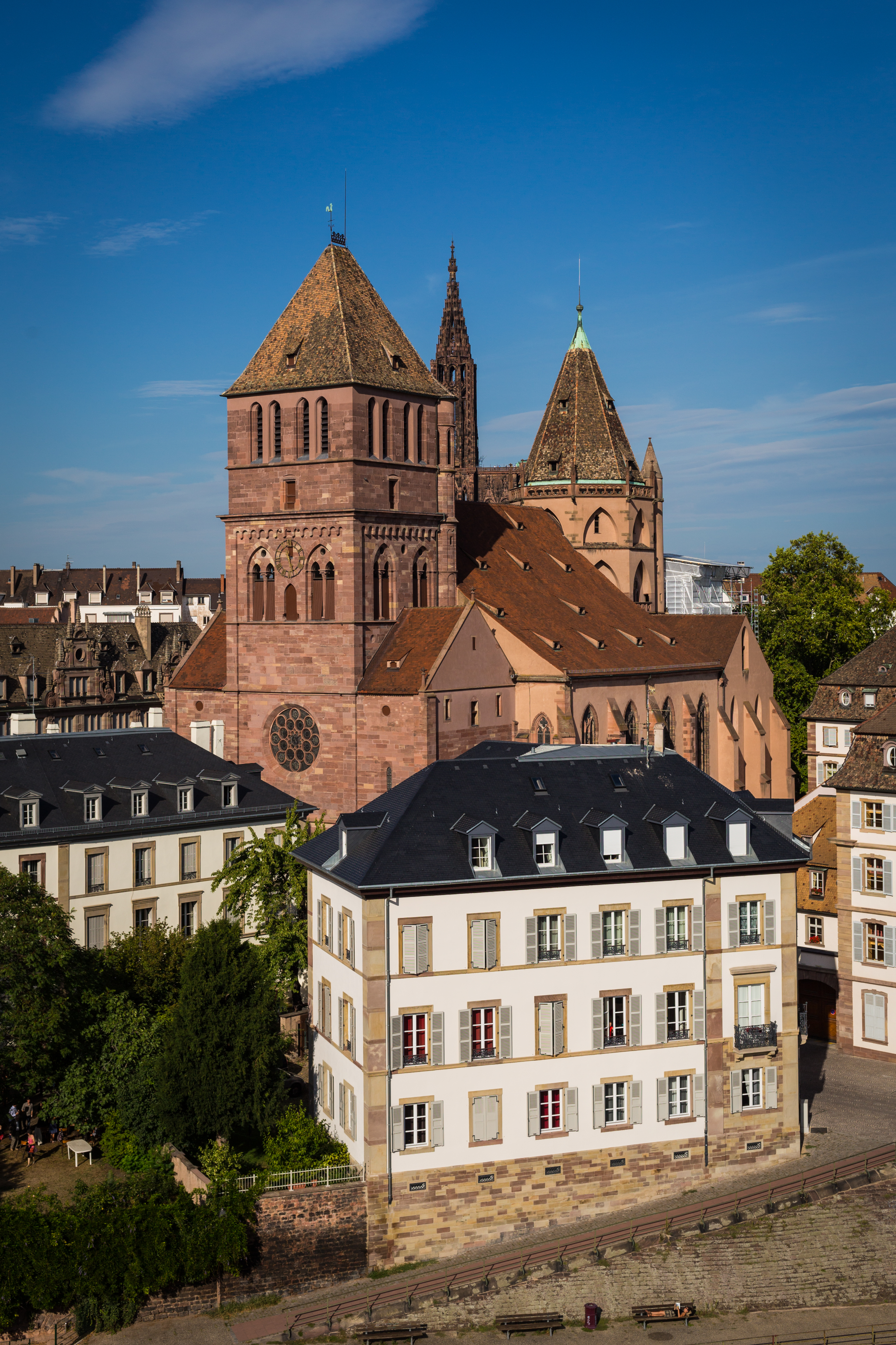 Église Saint-Thomas et cathédrale Notre-Dame Strasbourg août 2015.jpg